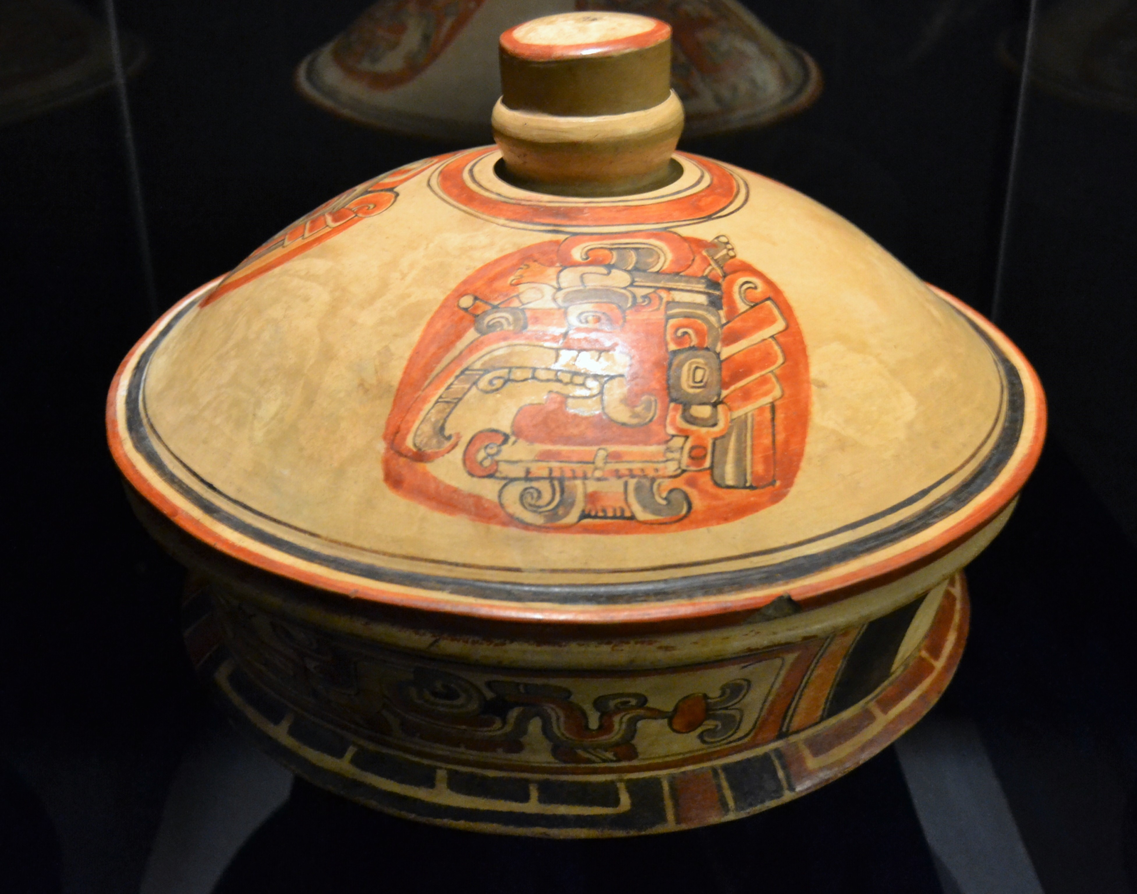 Recipient amb tapa amb el déu Itzamnaaj com a au. El Perú (Guatemala), període Clàssic Primerenc (250-600), ceràmica. Museu Nacional d'Arqueologia i Etnologia de Guatemala (MUNAE). Exposició Maies. L'enigma de les Ciutats Perdudes del museu arqueològic d'Alacant. Sobre la superfície de la tapa es van pintar tres cartutxos amb vora roja amb representacions del cap d'Itzamnaaj (el déu ocell suprem), identificat gràcies al seu bec corbat i ornaments típics del seu tocat.